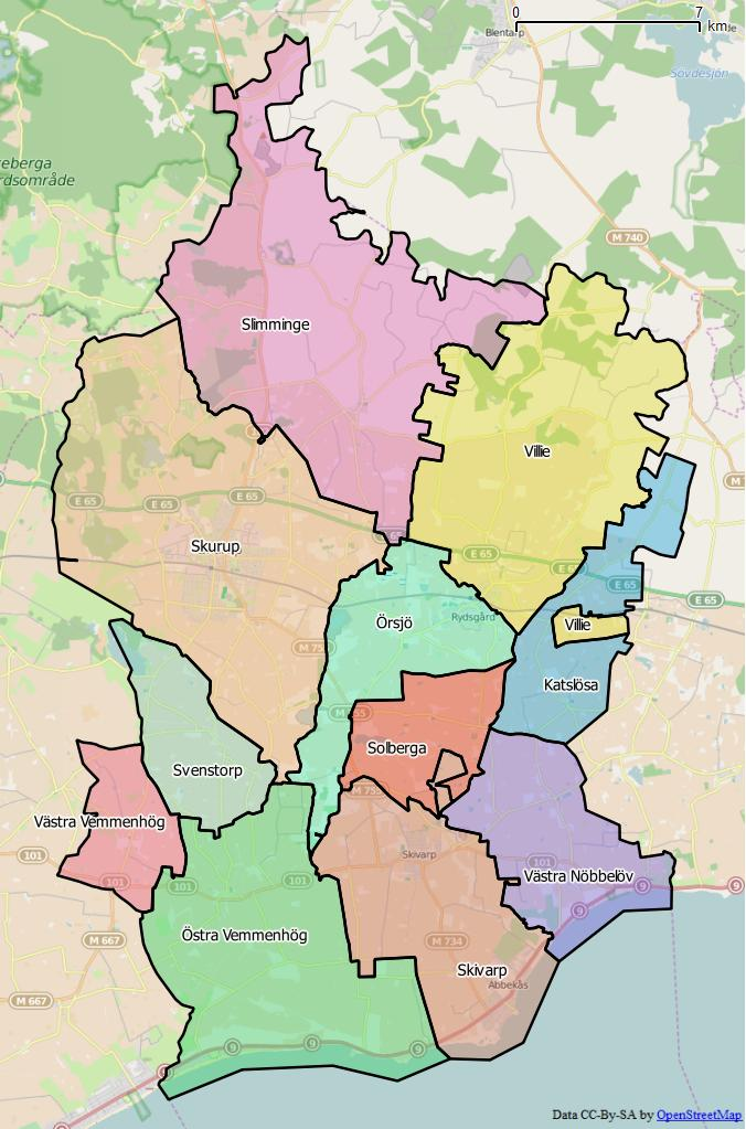 Distriktsindelningen i Skurups kommun World file: 42.1104413265888553 0 0 -42.1104413265888553 1494569.33649374335072935 7477293.38045336864888668